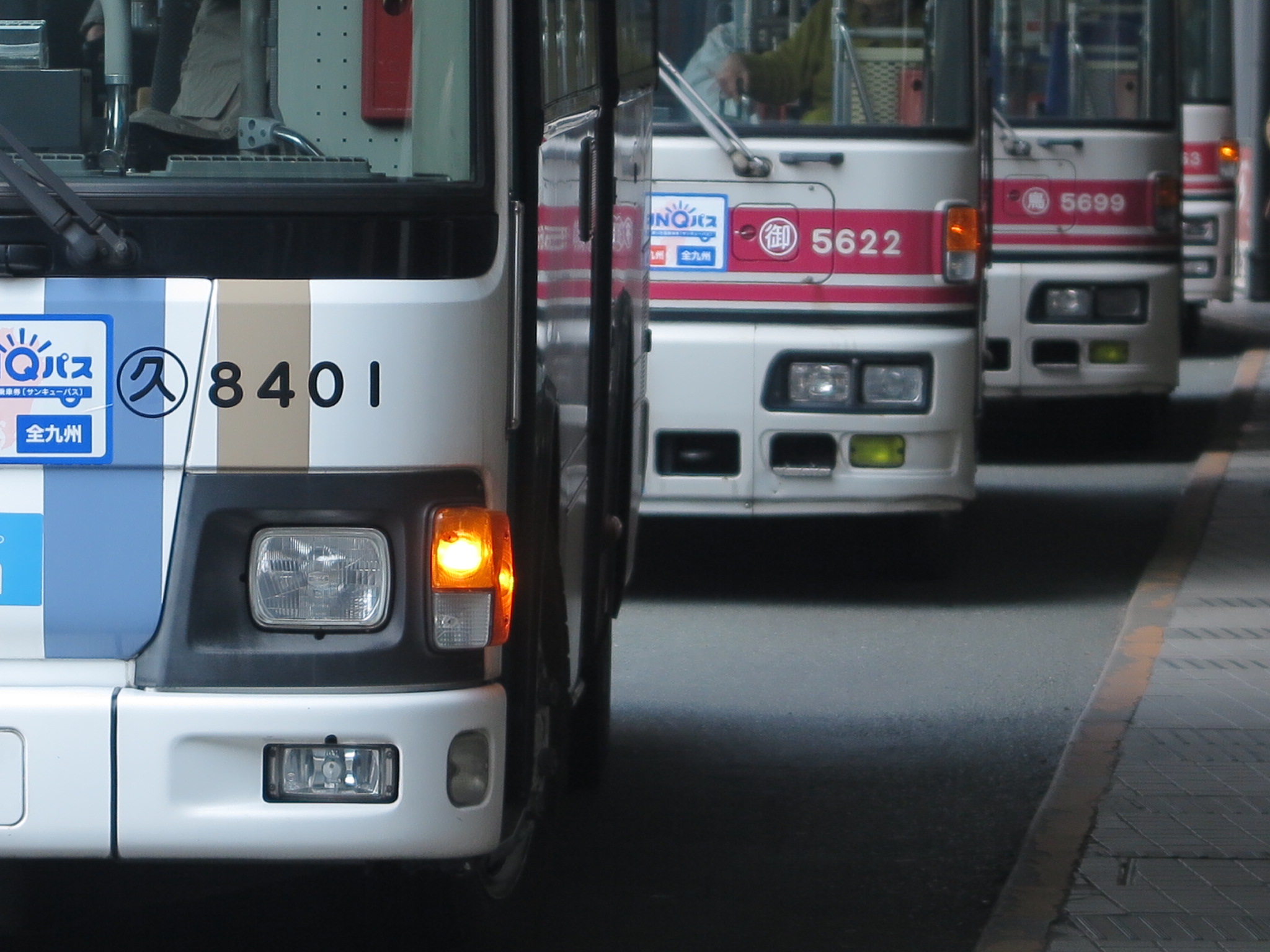 西鉄バスの車番表記例